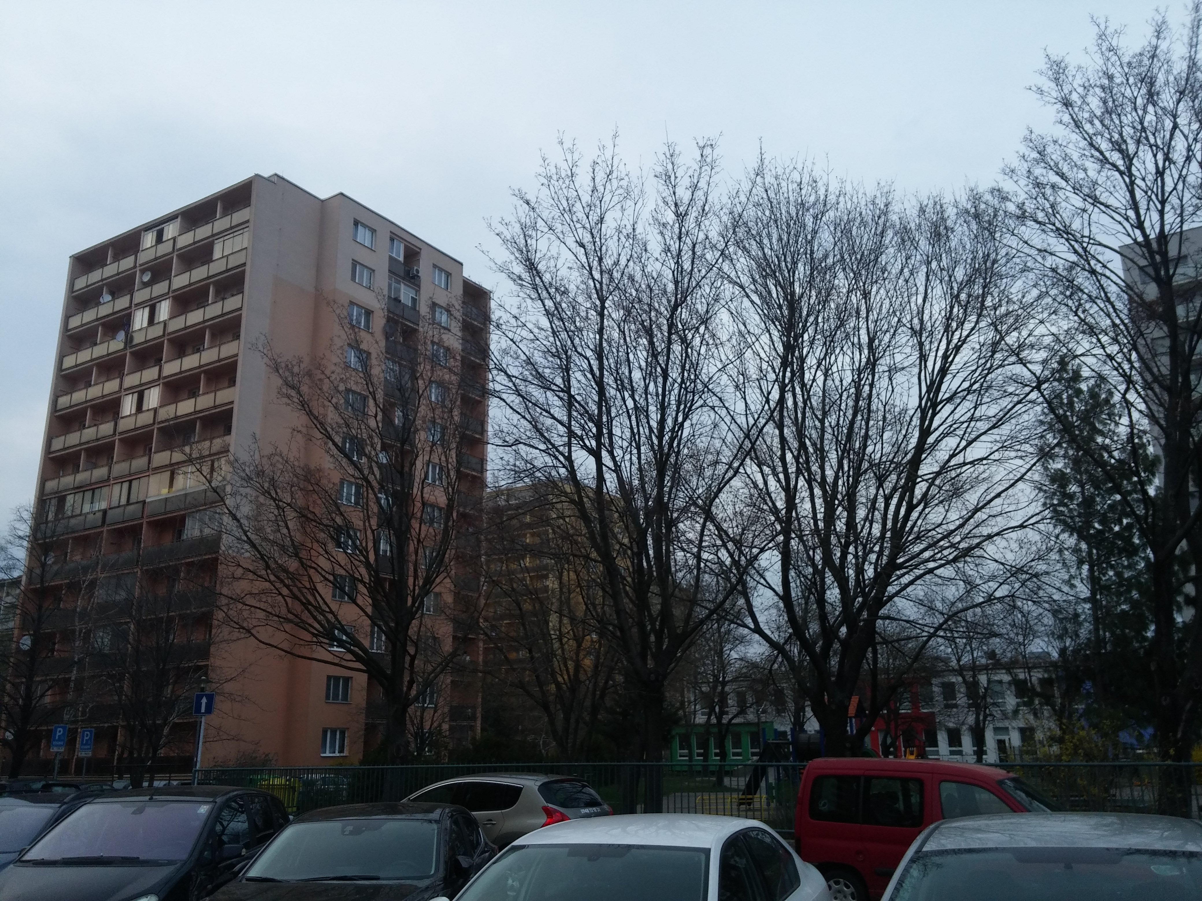 Hálkova, Nové Mesto, Bratislava